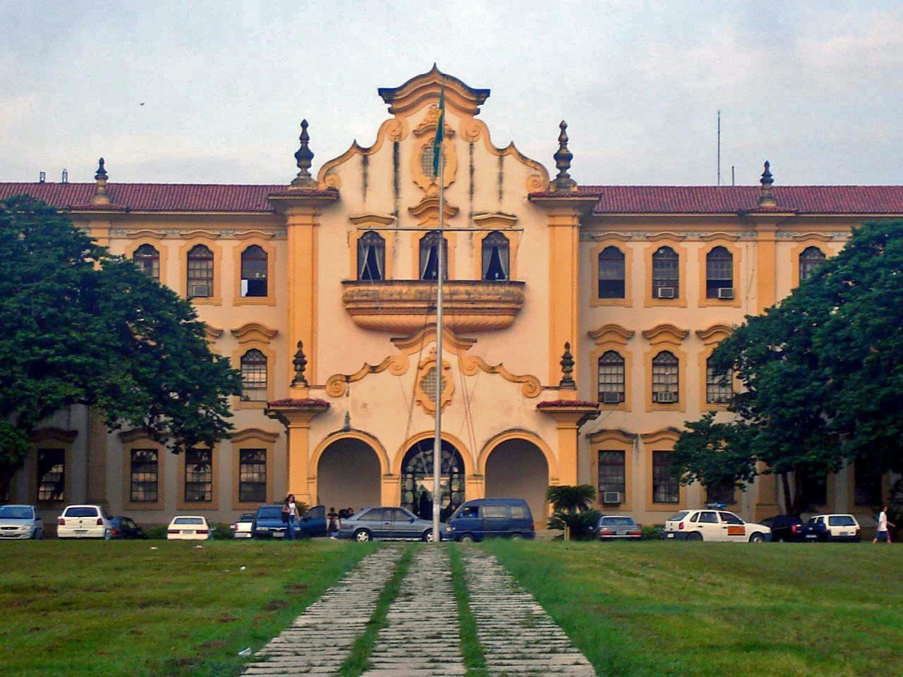 Universidade Federal Rural do Rio de Janeiro (Rural Federal University of Rio de Janeiro), Seropédica in the Brazilian state of Rio de Janeiro.